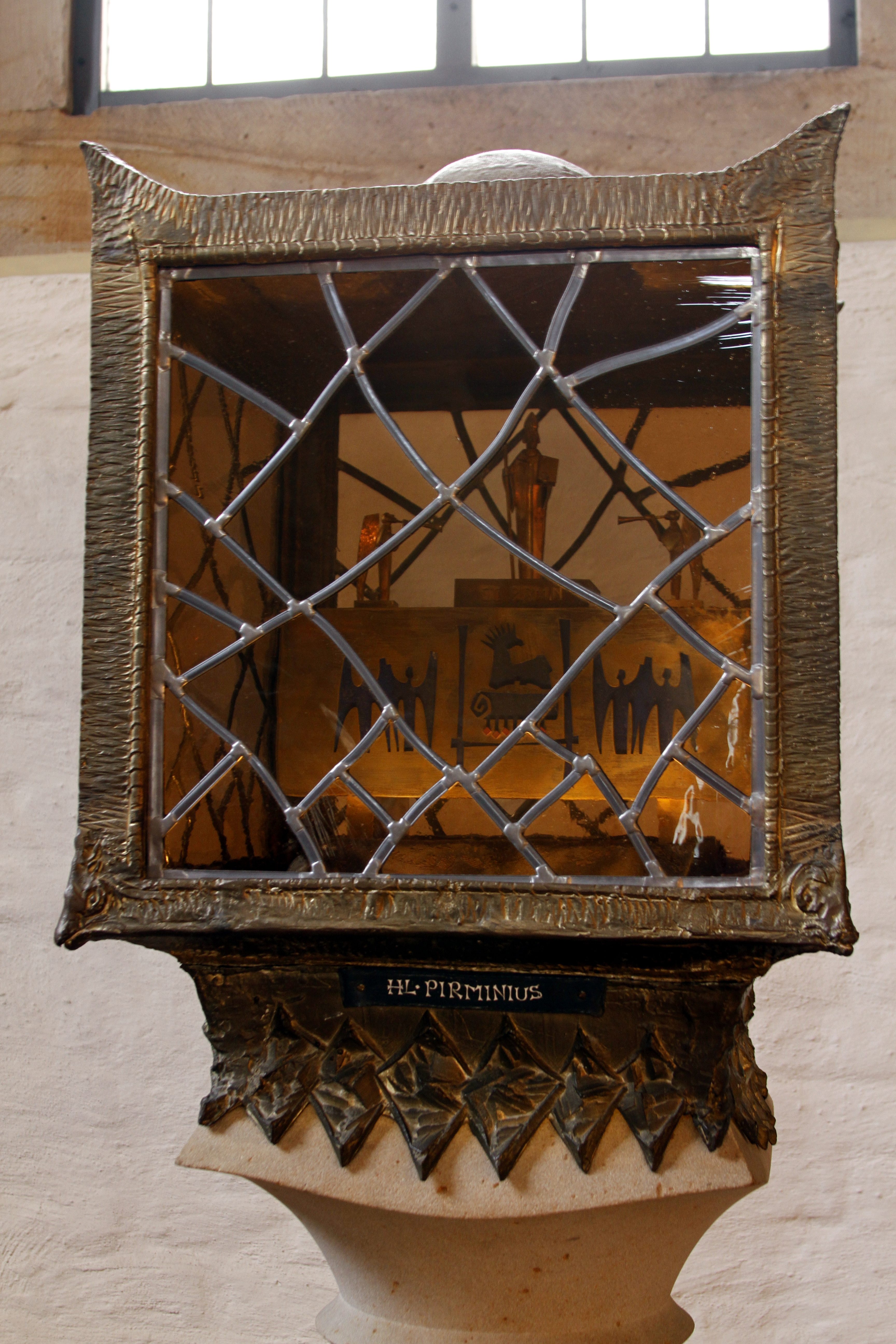 Speyer Cathedral - Speyer - Germany